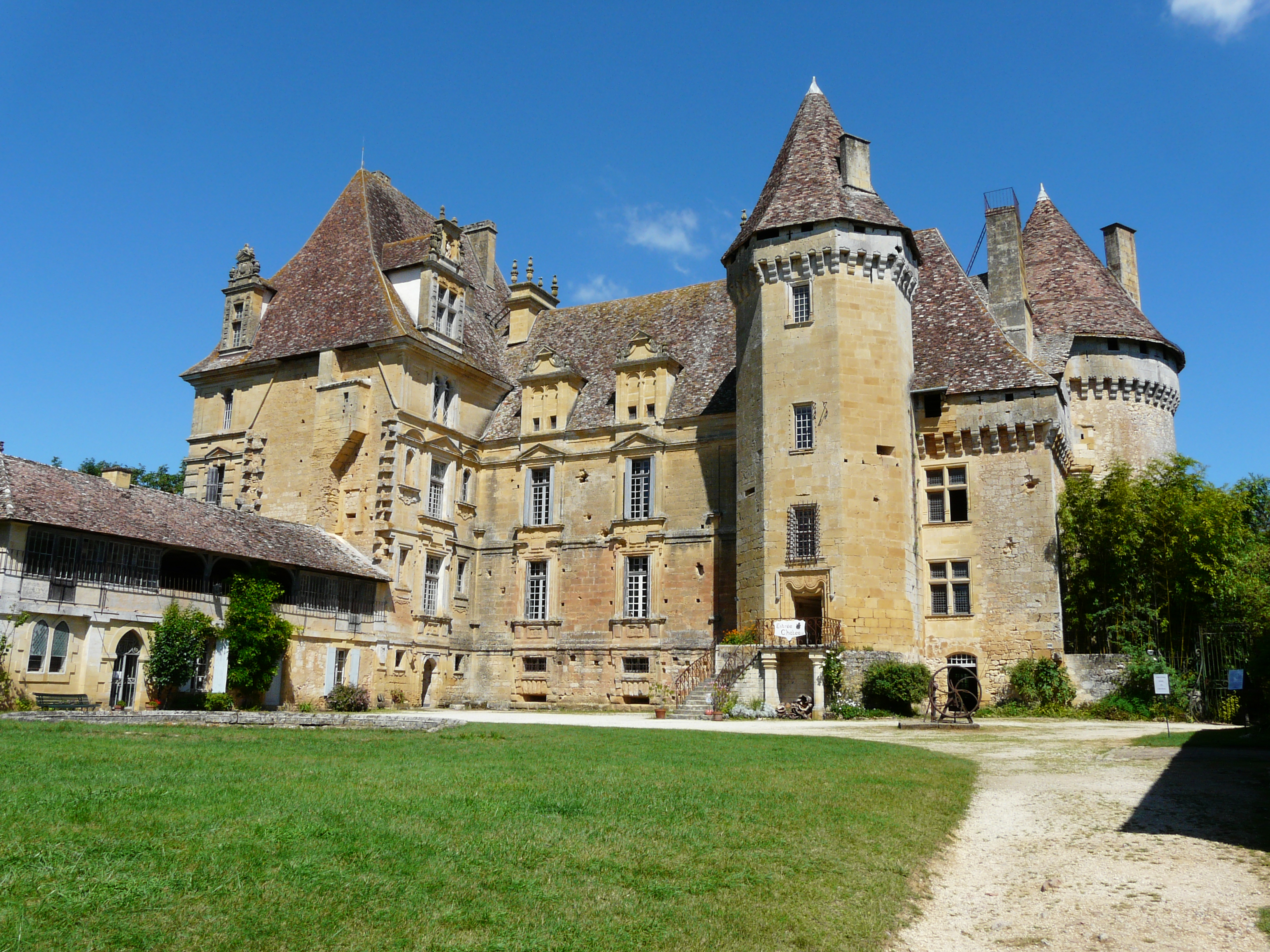 Le château de Lanquais vu depuis le sud-est, Lanquais, Dordogne, France.